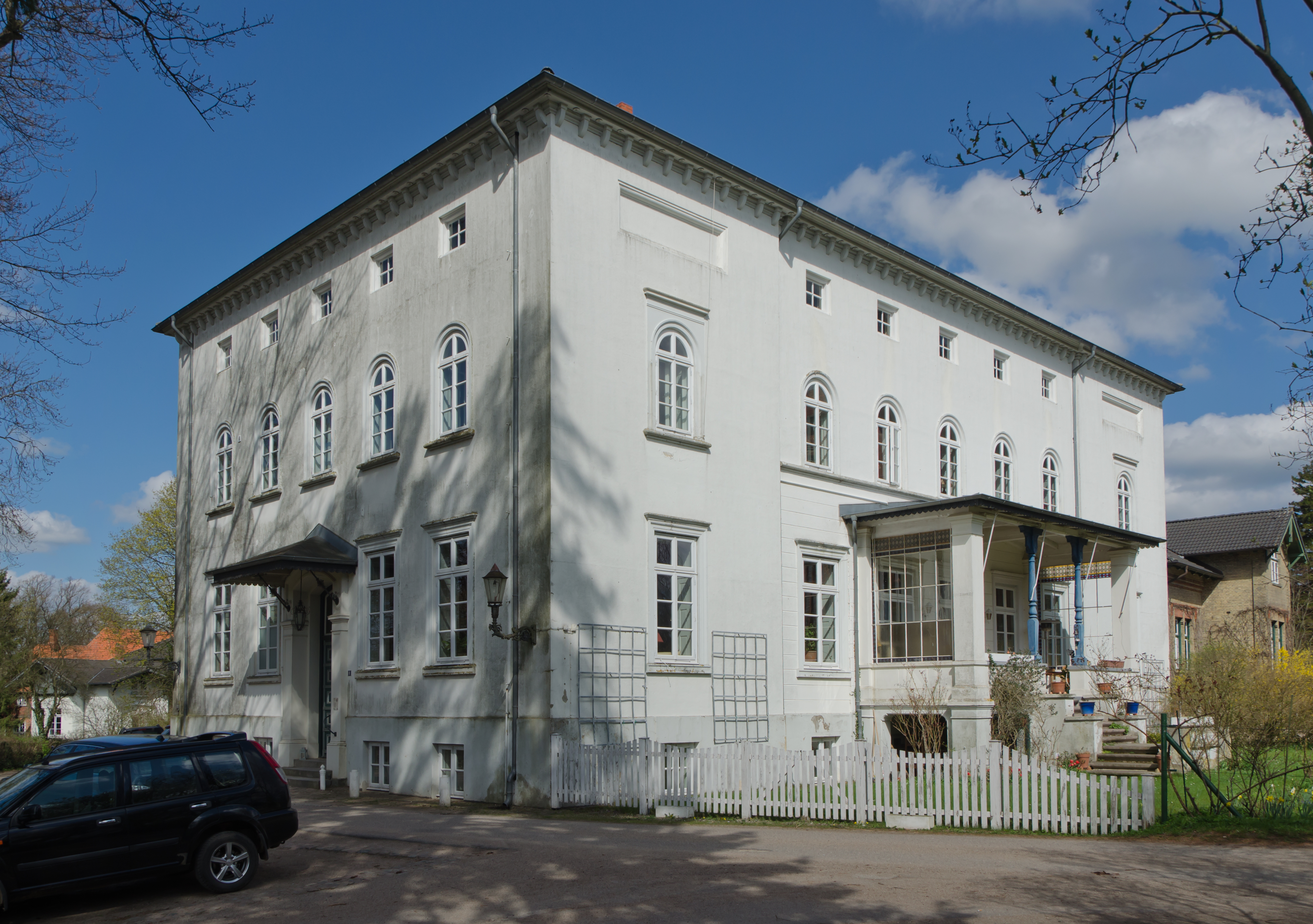 Preetz Klosterhof 8 Probstenhaus